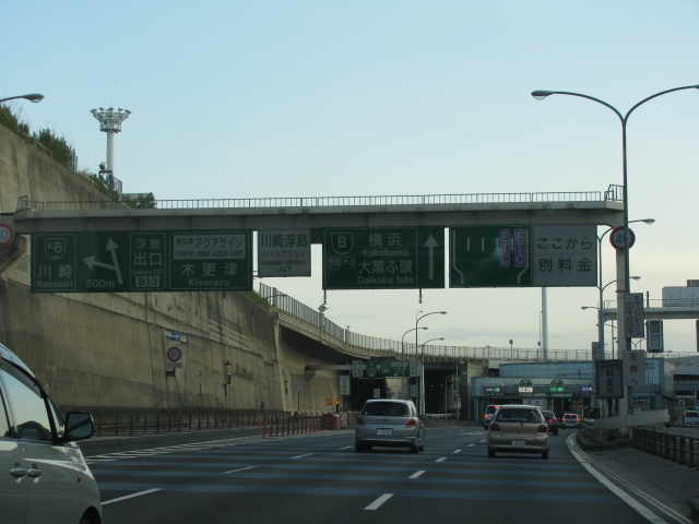 2009年8月11日、川崎浮島JCT付近で湾岸線西行き方面より撮影